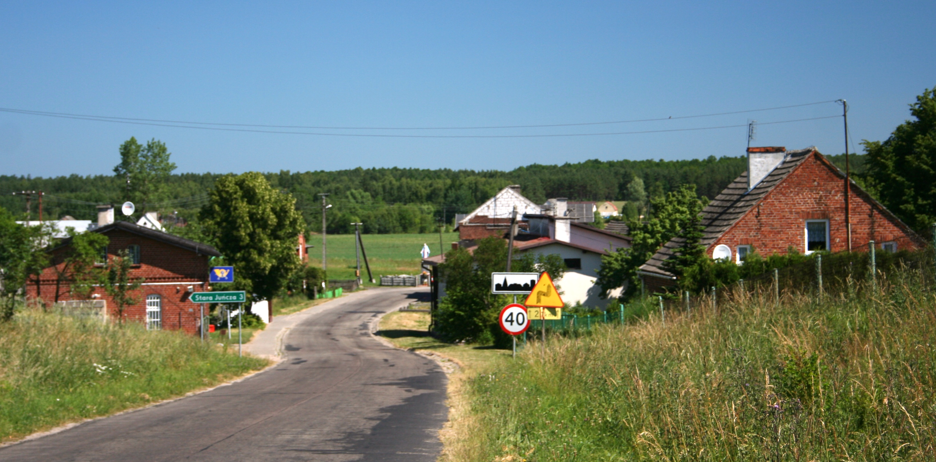 Gotelp - widok ogólny miejscowości, powiat chojnicki